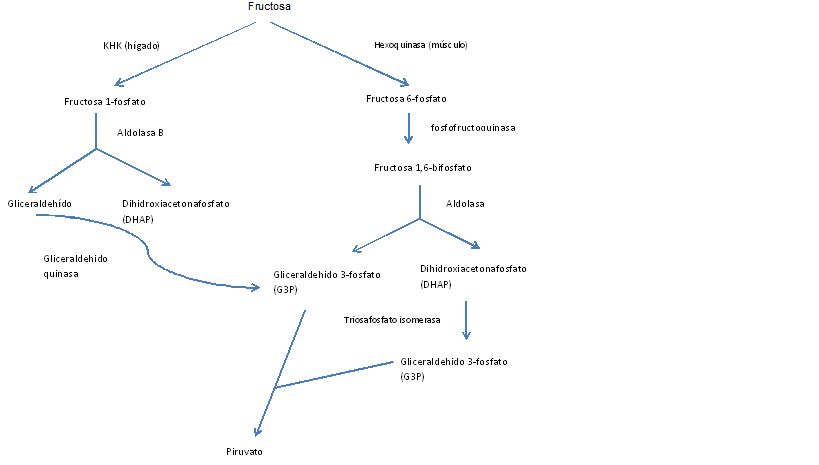 Metabolismo de la fructosa y la inserción de sus productos en la glucólisis